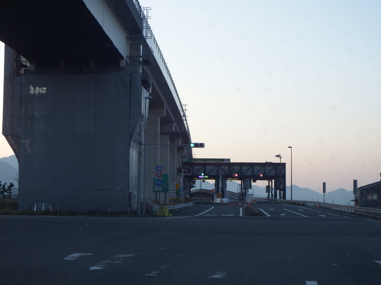 いよ小松インター入口